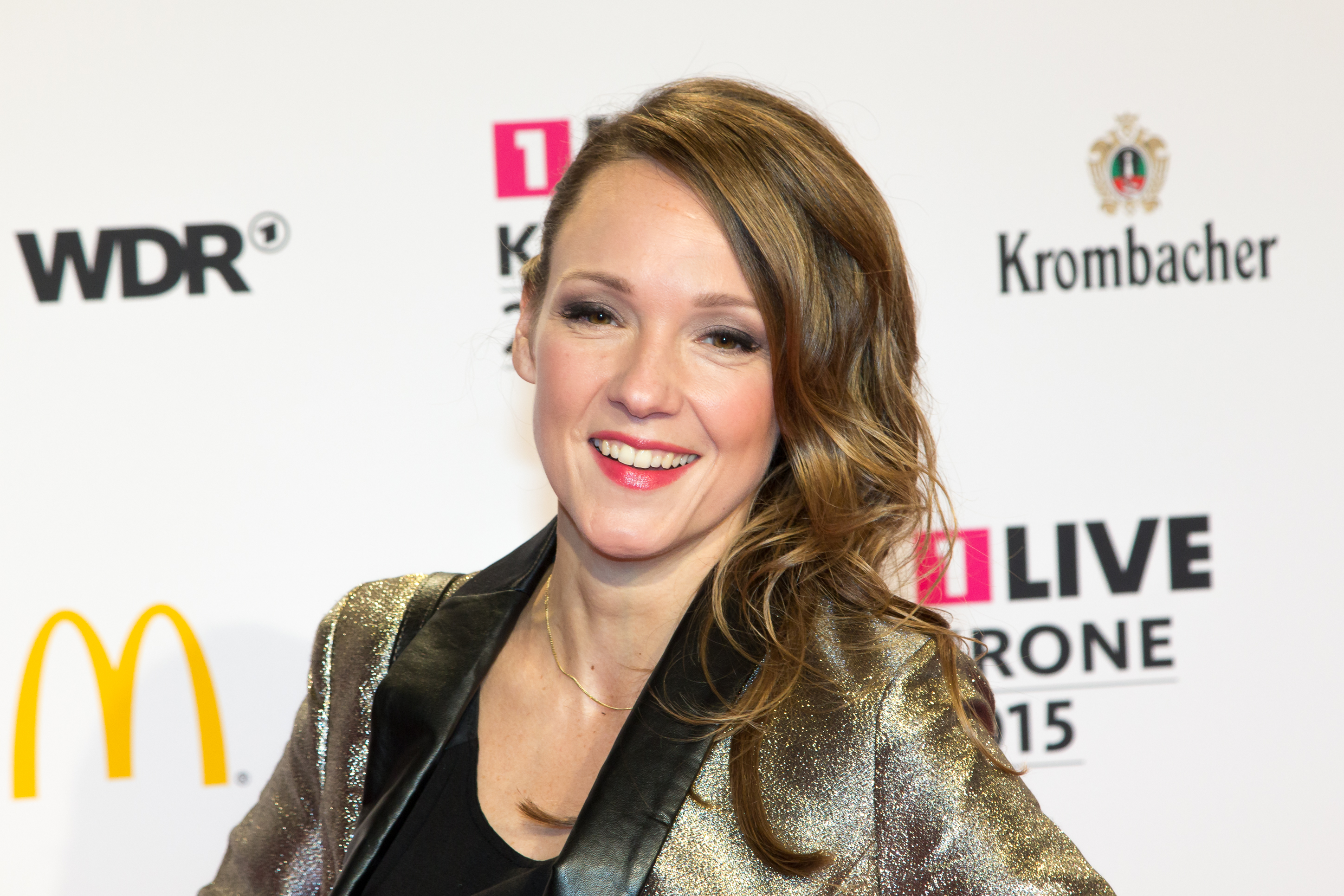 1lIVE Krone 2015 - Carolin Kebekus